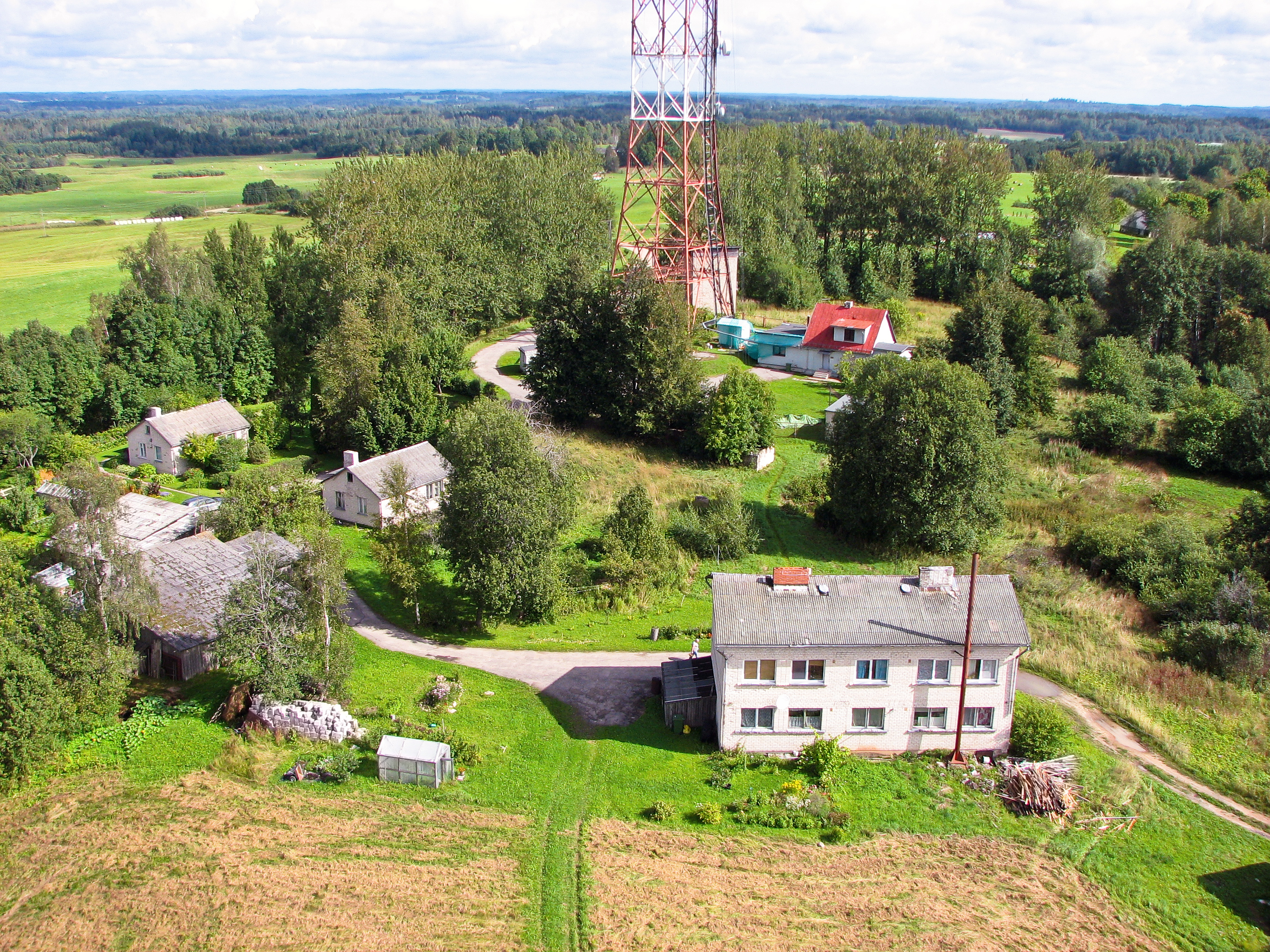 15. Вид на Восток. Посёлок